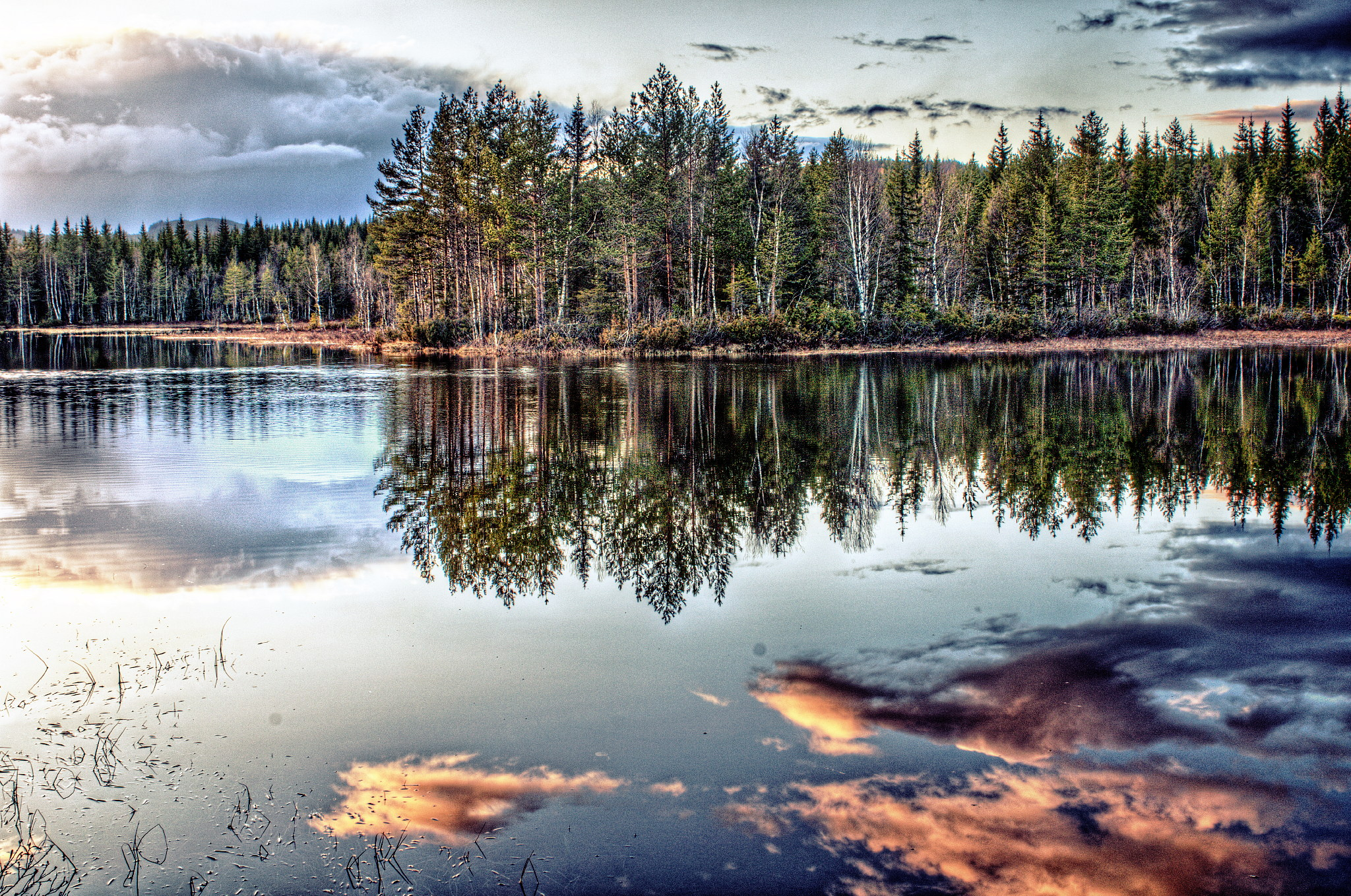 Leira elv i Nannestad